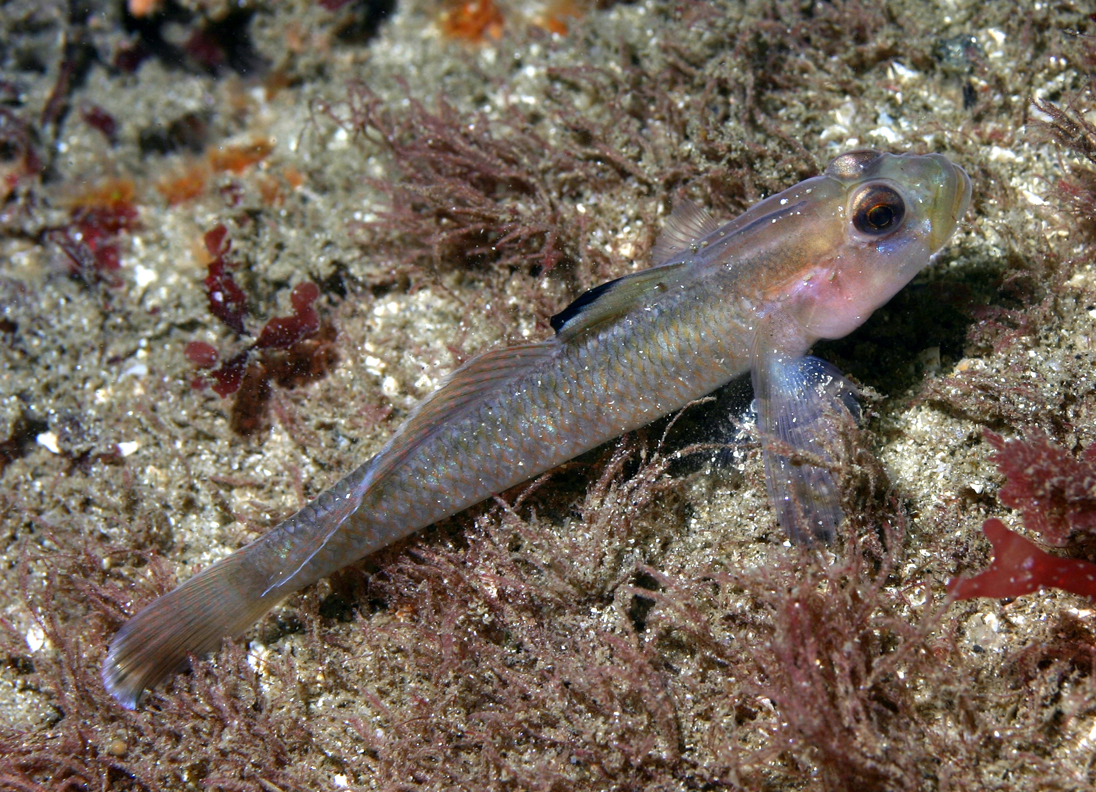 Black-eyed goby (Coryphopterus nicholsii Syn. Rhinogobiops nicholsii)